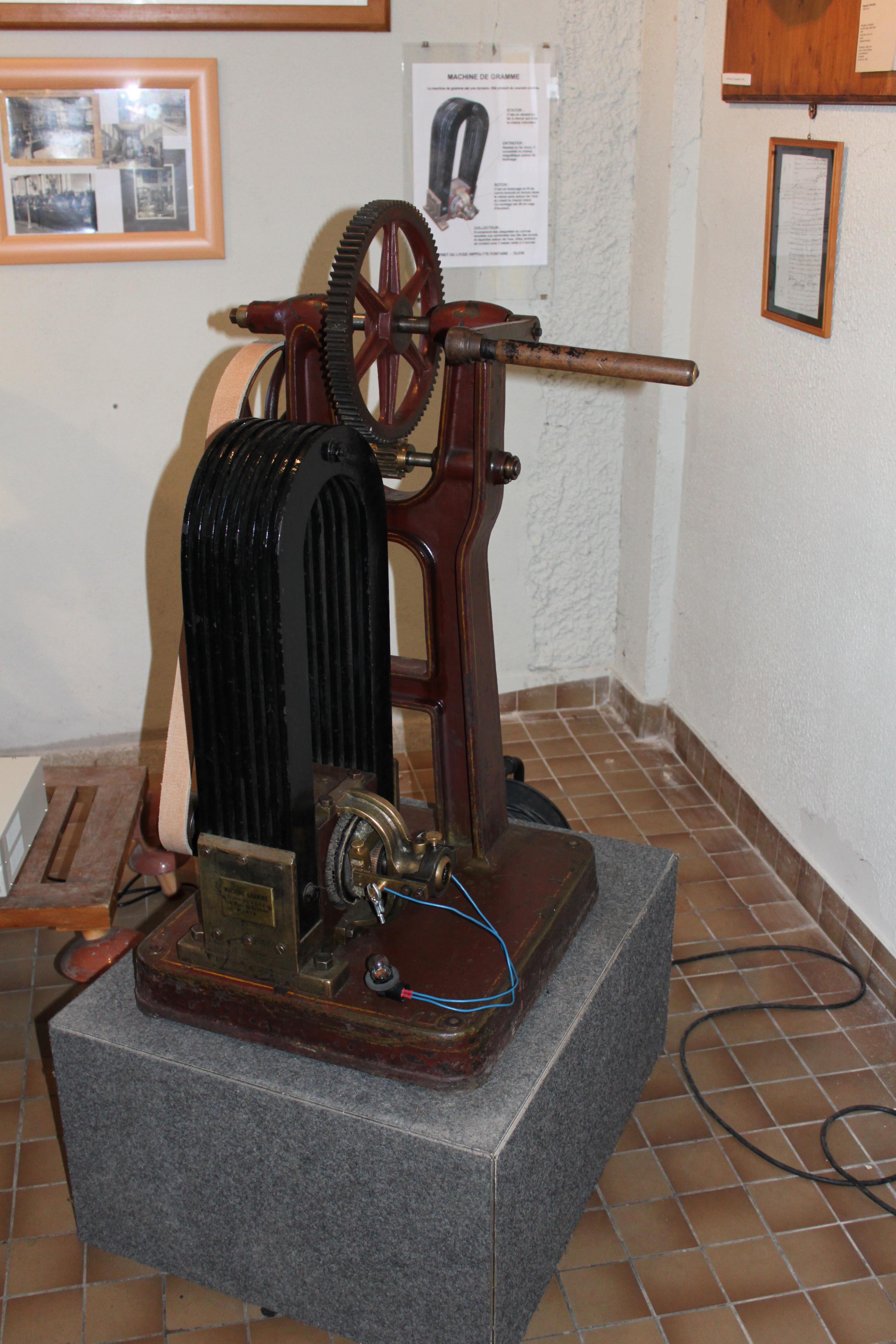 Machine de Gramme, Musée de l'électricité, Musée de l'électricité de Bourgogne, 42, avenue de Stalingrad, Dijon, Bourgogne, France